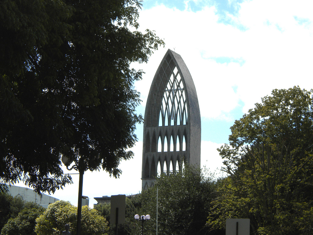 Catedral de la ciudad de Osorno, diócesis de osorno, Chile.